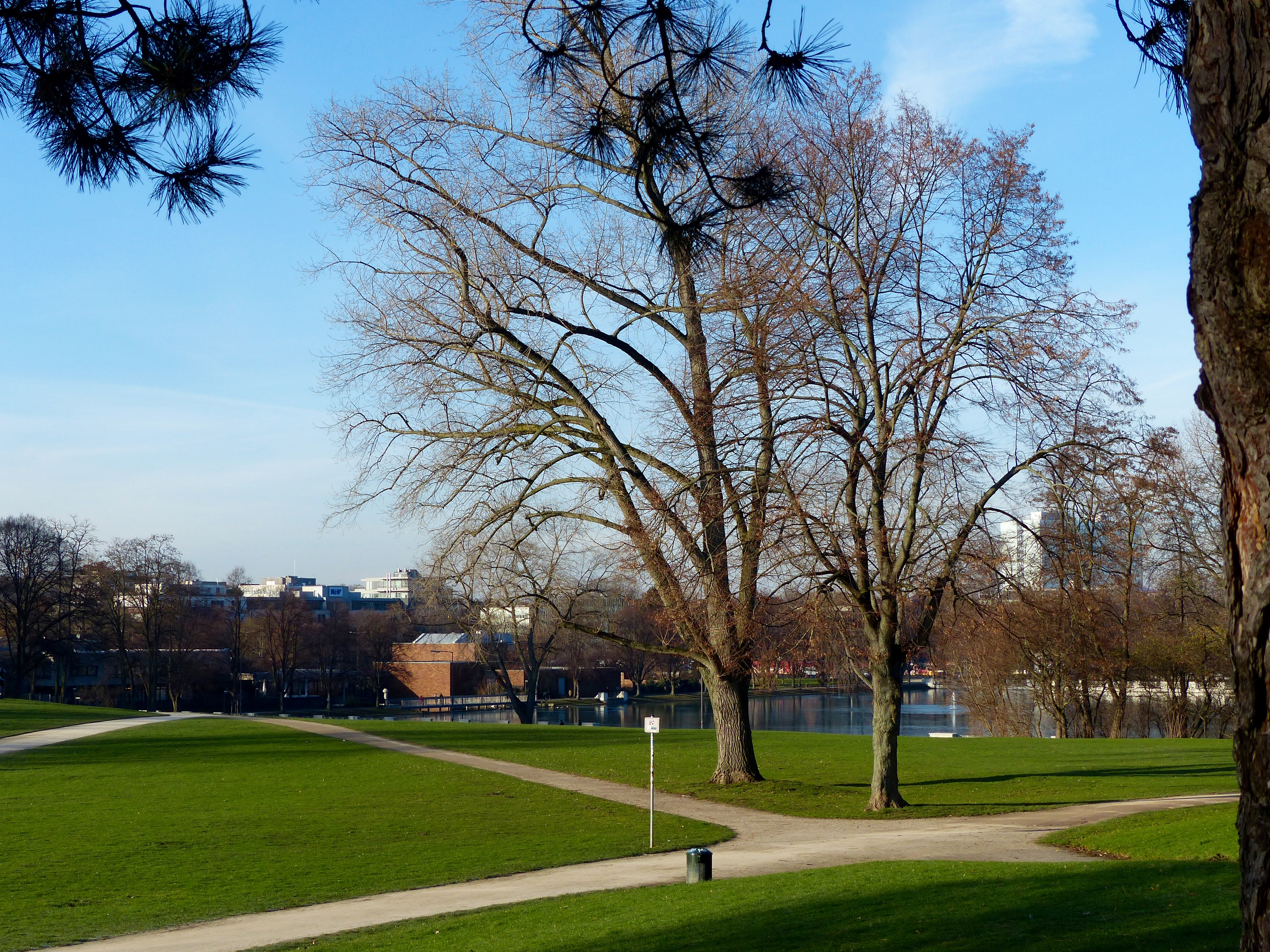 Hiroshima-Nagasaki-Park in Köln